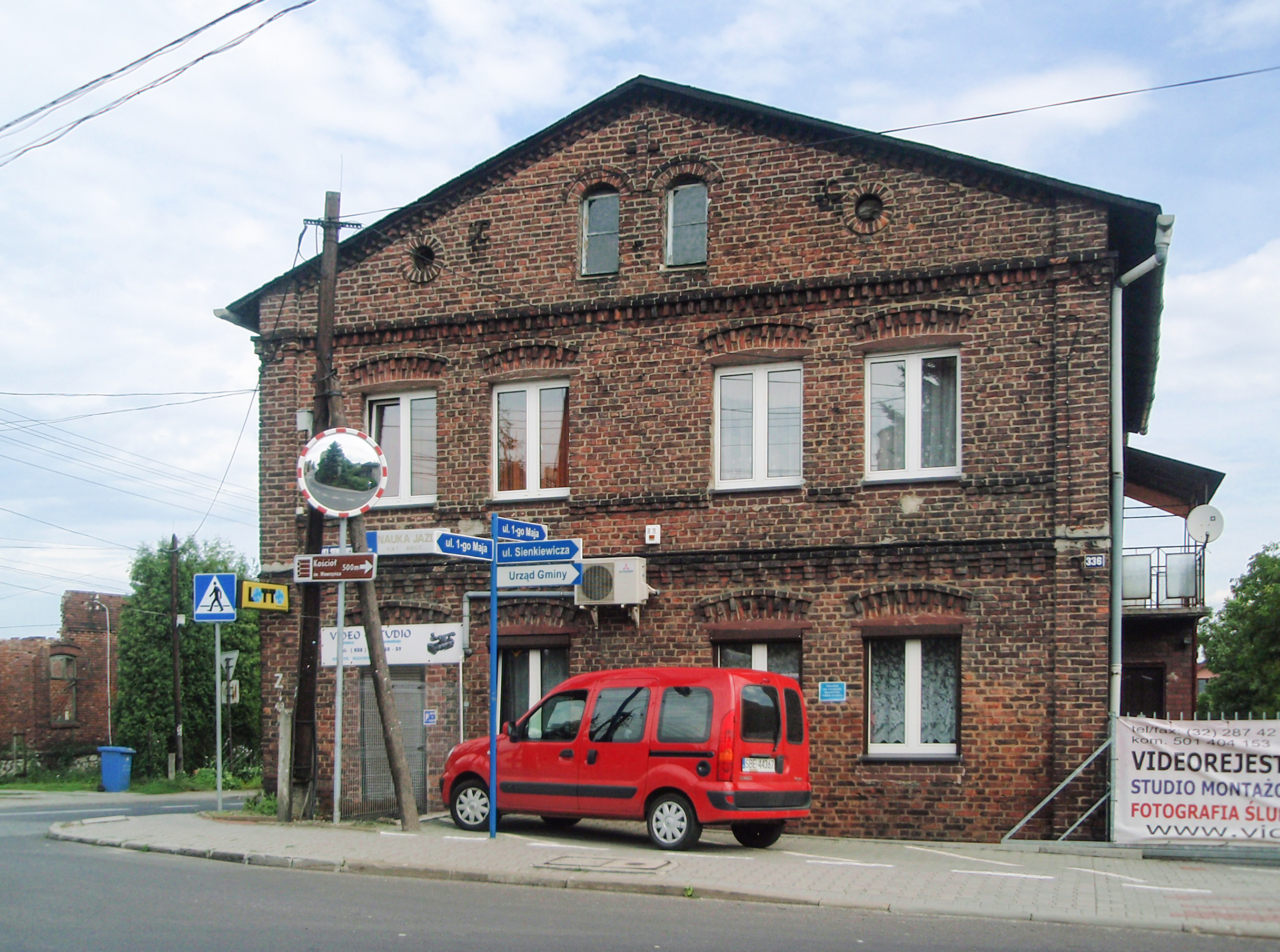 Skrzyżowanie ulic 1-go maja i Sienkiewicza w Bobrownikach (woj. śląskie)